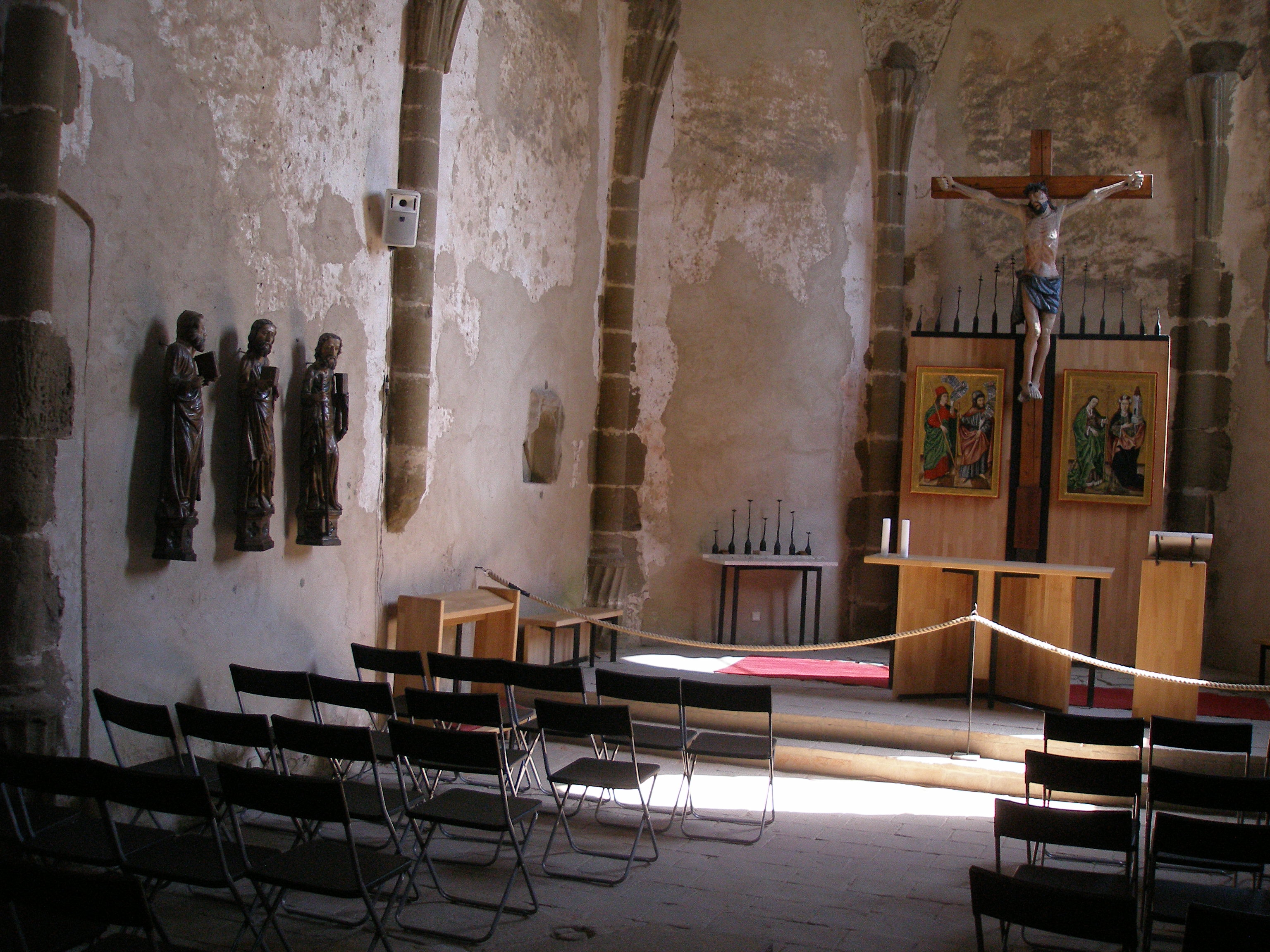 Interiér Spišského hradu. Slovensko.